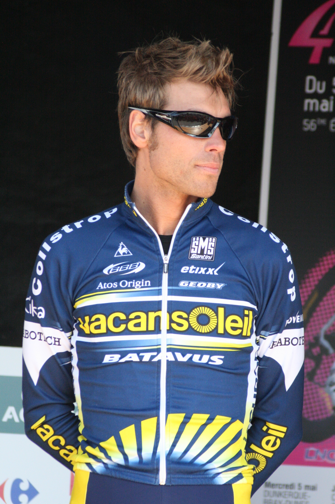 Matteo Carrara lors de la présentation des équipes des 4 jours de Dunkerque